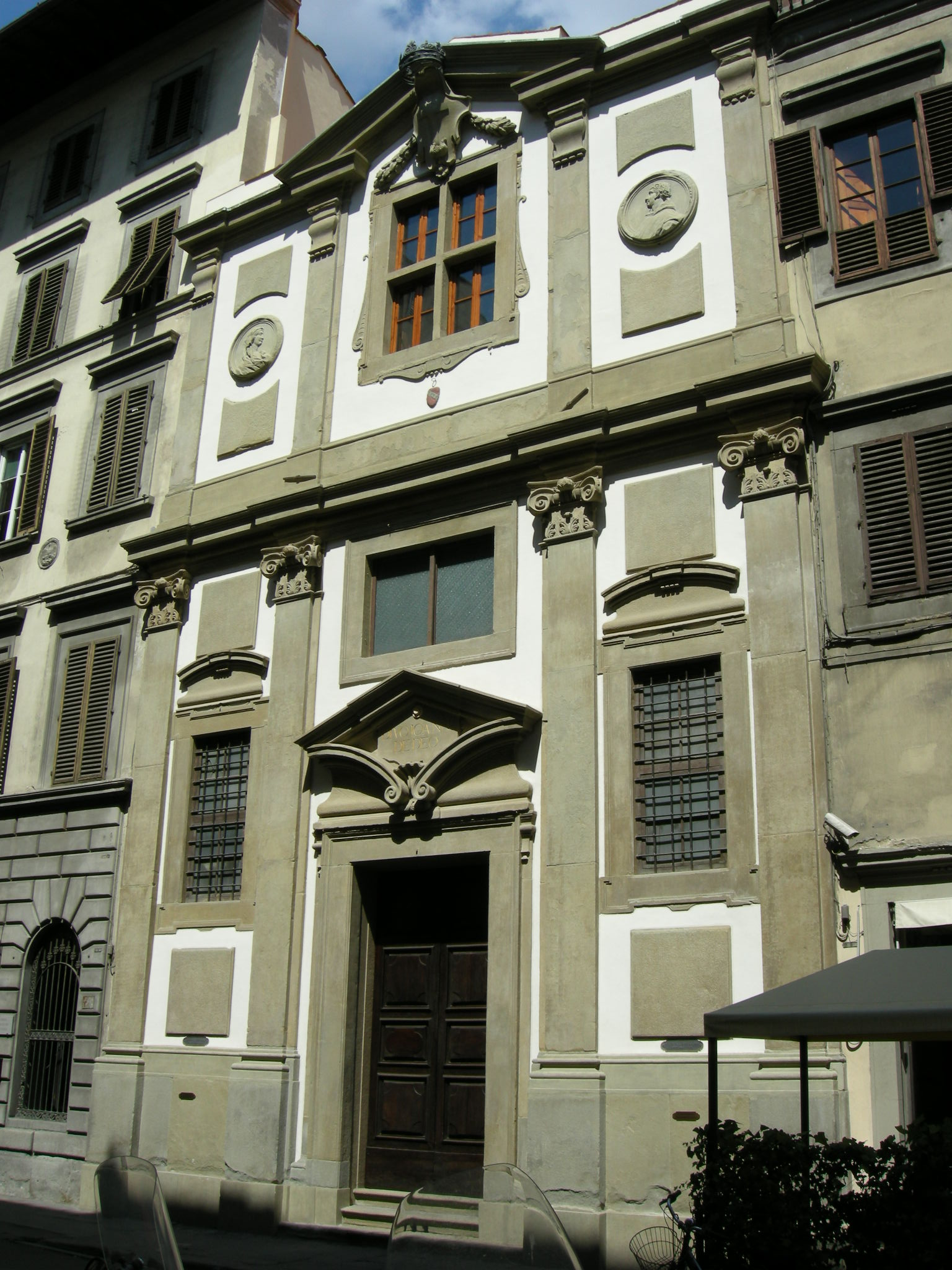 San giovanni di dio, madonna dell'umiltà, facciata